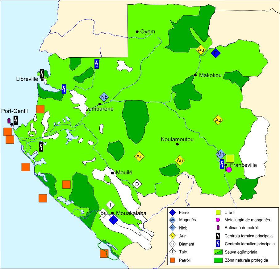 Ressorsas economicas principalas de Gabon